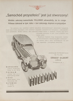 „Samochód przyszłości” jest już stworzony! Wielkie sukcesy samochodu HILLMAN udowodniły, że to czego Hillman dokonał w tym roku - inni dokonają dopiero w przyszłym GENERALNA REPREZENTACJA NA POLSKĘ ERNEST GILBERT, ŁÓDŹ